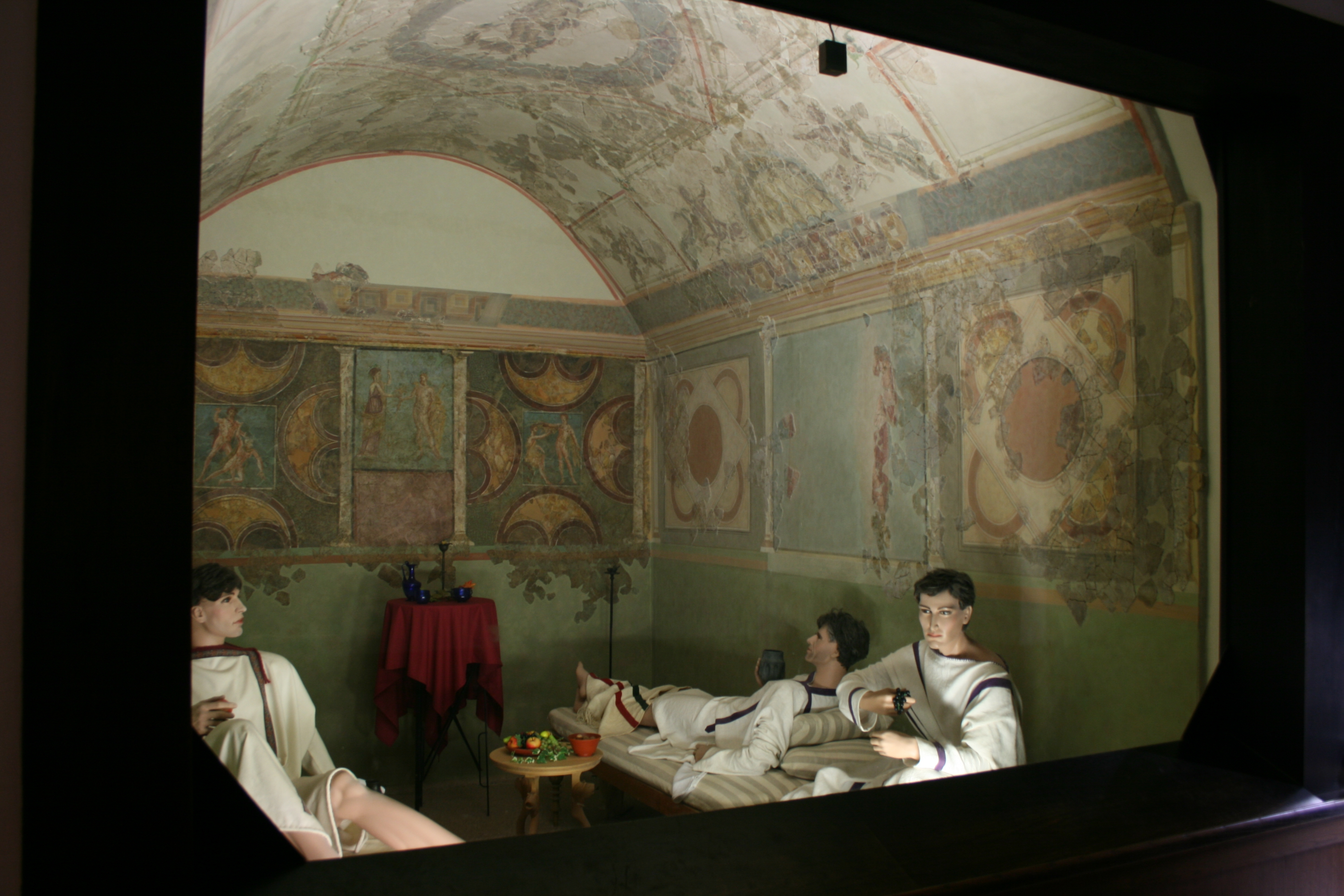 Rekonstruierte Wandmalereien aus einer Offizierswohnung des Kastell Echzell. Rekonstruktion in der principia des Kastells Saalburg, Saalburgmuseum Bad Homburg v.d.H. (mit freundl. Genehmigung).